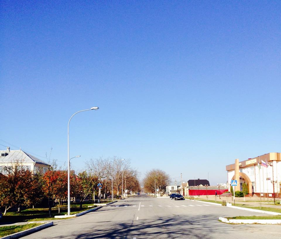 Дом Культуры в Шитхале